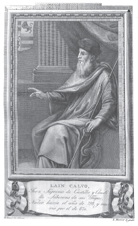 Retrato de Lain Calvo.